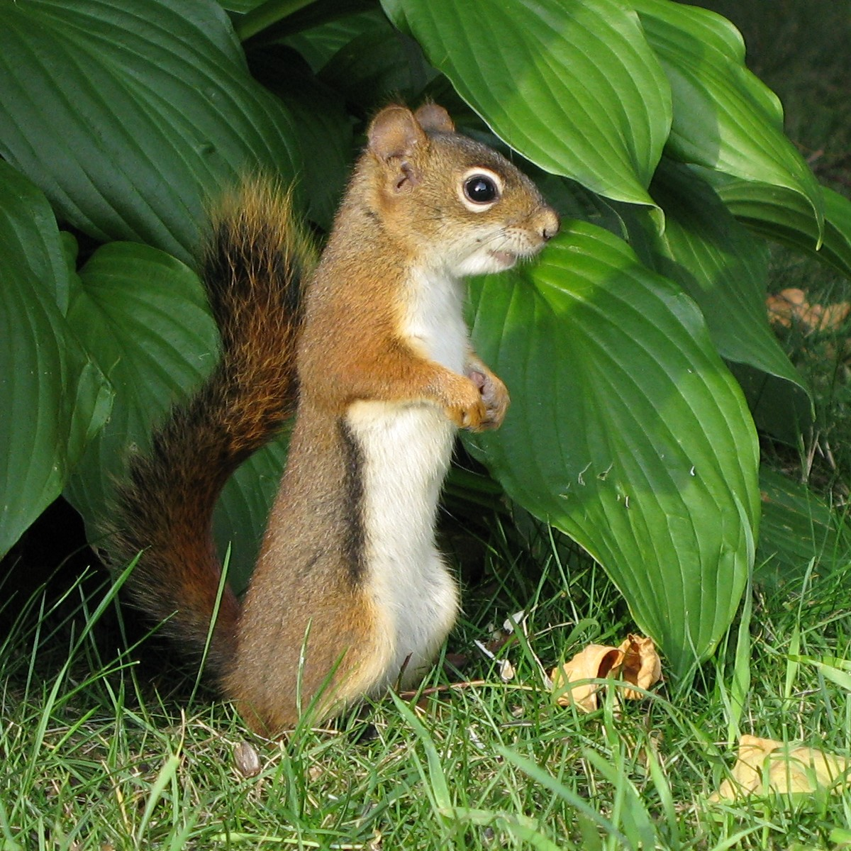 Écureuil roux nord-américain -- North American Red Squirrel Bas-Saint-Laurent -- Province de Québec -- Canada Prise en septembre 2007 -- Taken in September 2007